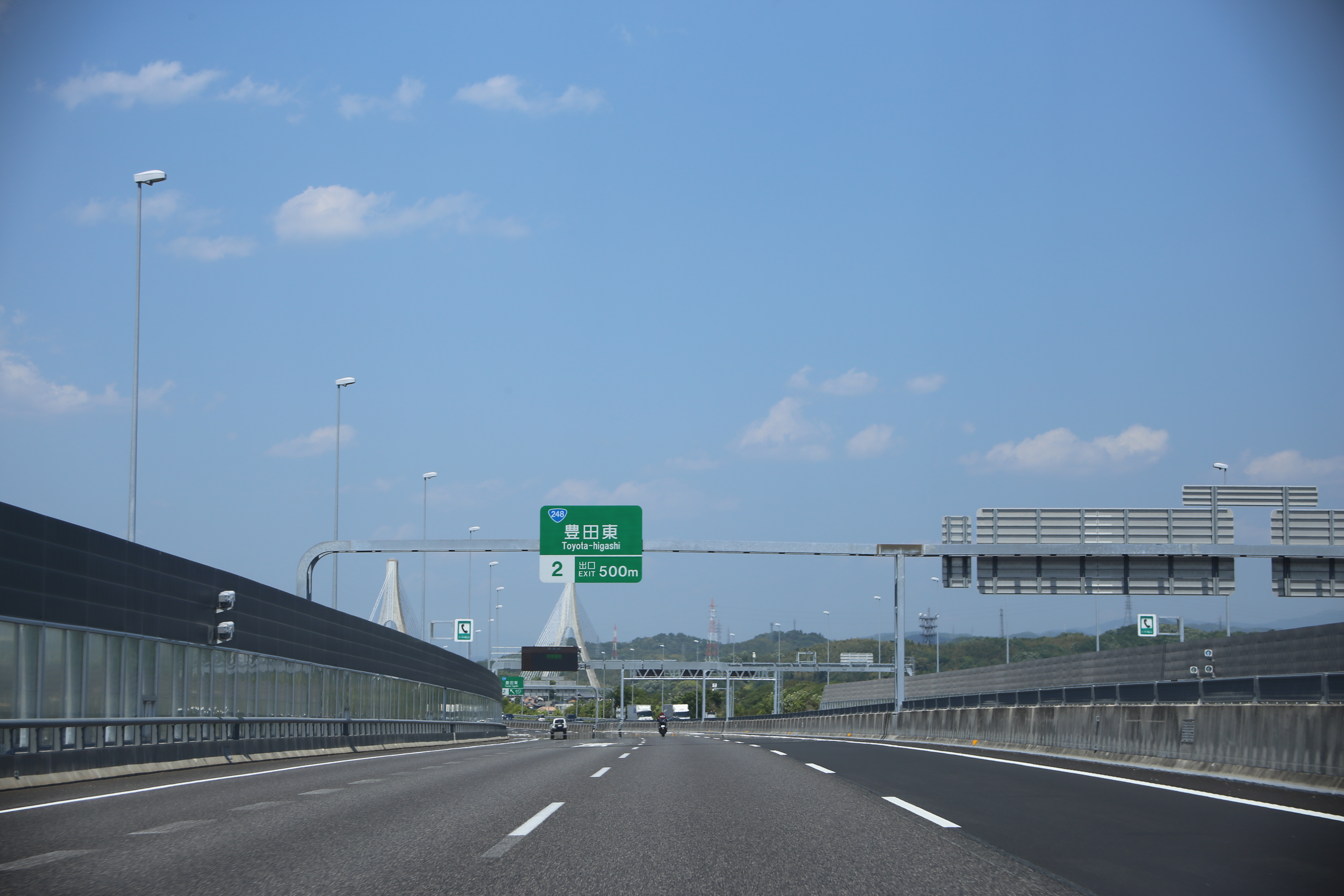 豊田市渡刈町下糟目の伊勢湾岸自動車道豊田東インターチェンジ付近を同自動車道上り（東京方面）より撮影